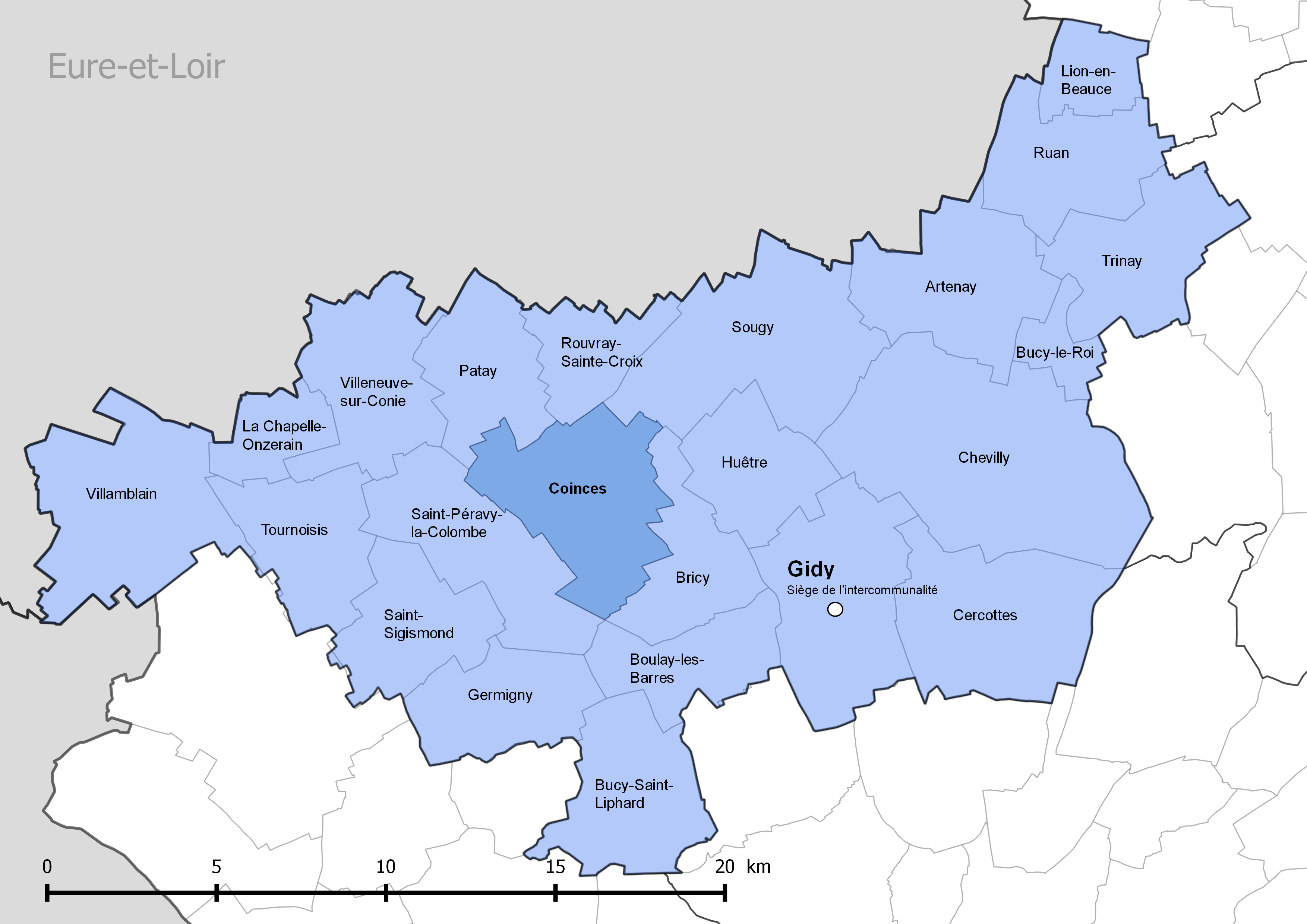 Périmètre de la communauté de communes de la Beauce loirétaine - Situation de la commune de Coinces